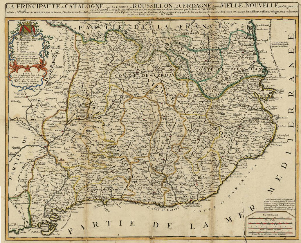 Mapa de Cataluña dividida en veguerías (1694), publicado en el Atlas royal contenant les cartes generales du monde, de Jean-Baptiste Nolin.